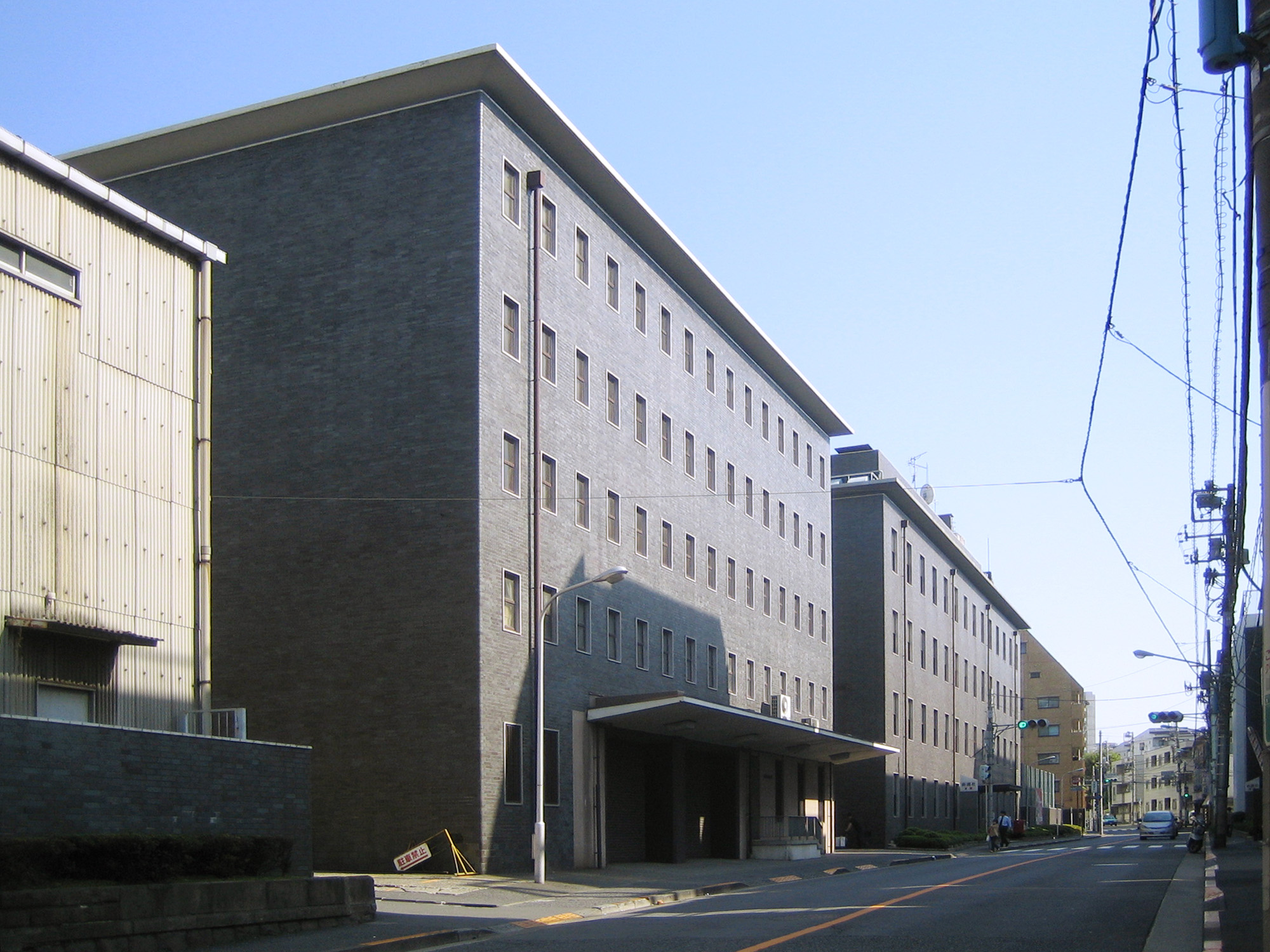 Shinchosha (新潮社 Shinchōsha), a publisher in Shinjuku, Tokyo, Japan